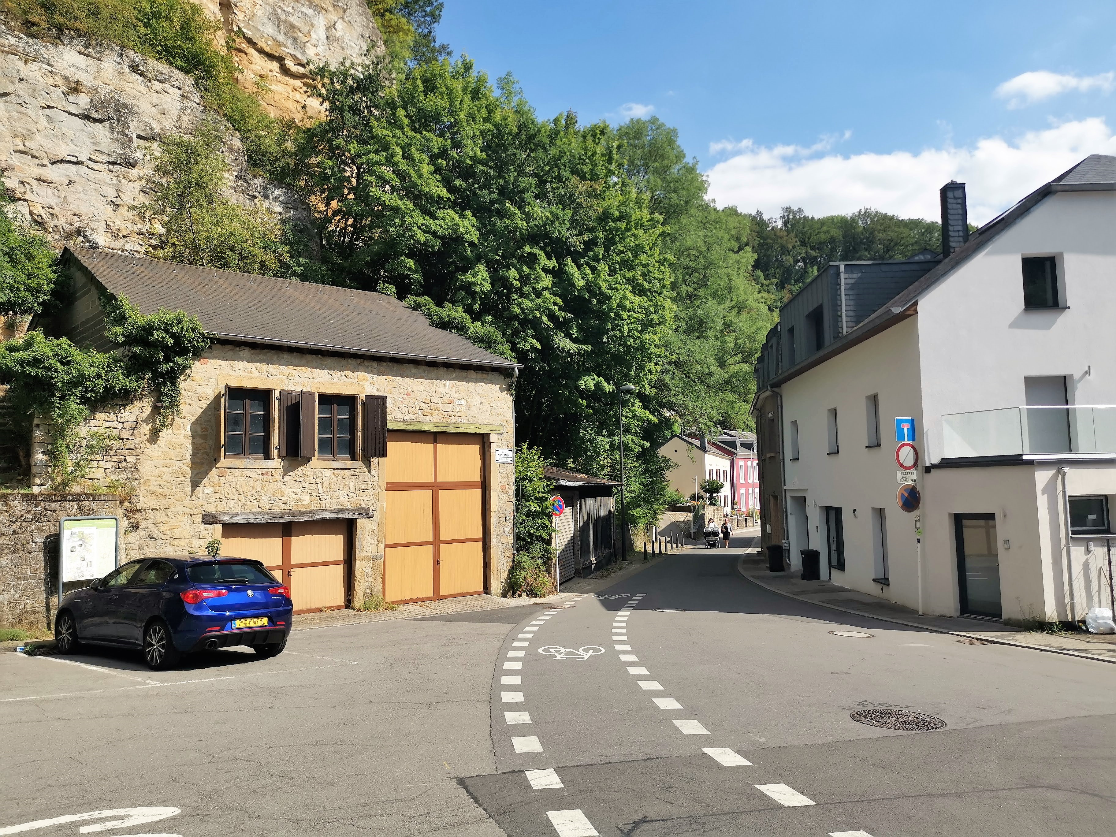 Luxembourg. Point de départ du Sentier pédestre national du Sud à Pulvermühl.